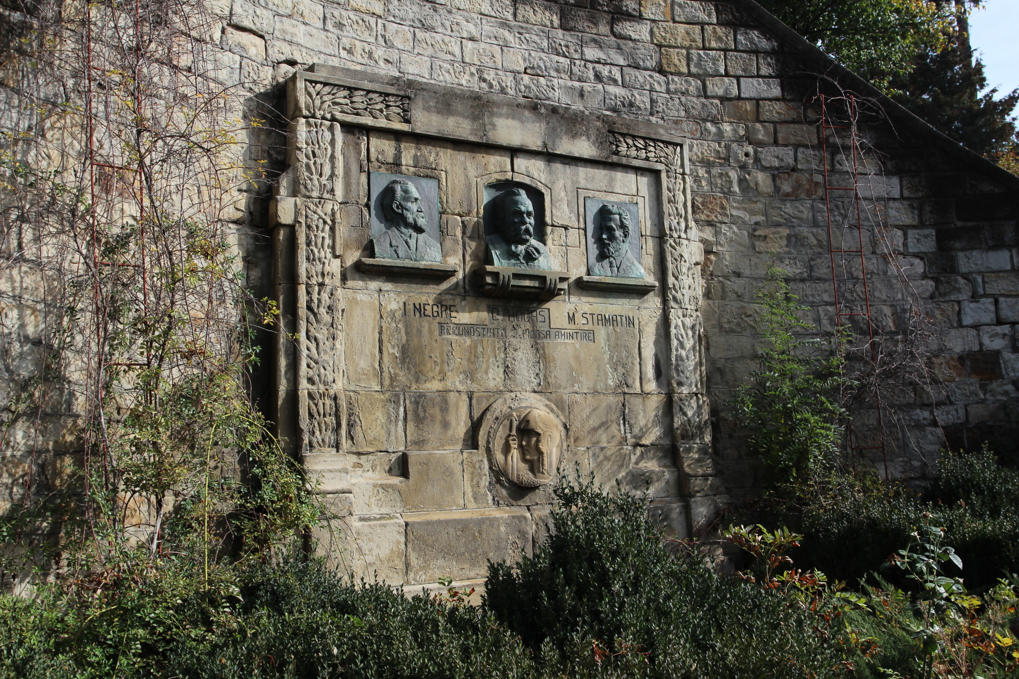 Basorelief: Calistrat Hogaș, Ion Negre, Matei Stamatian